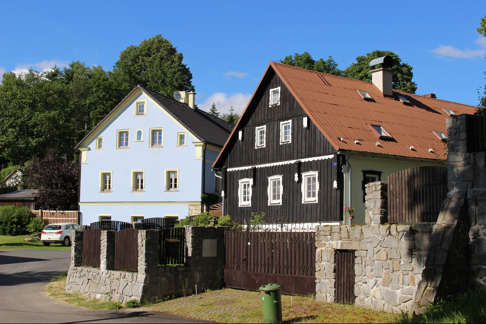 Svatá Kateřina, část obce Rozvadov, okres Tachov, Plzeňský kraj